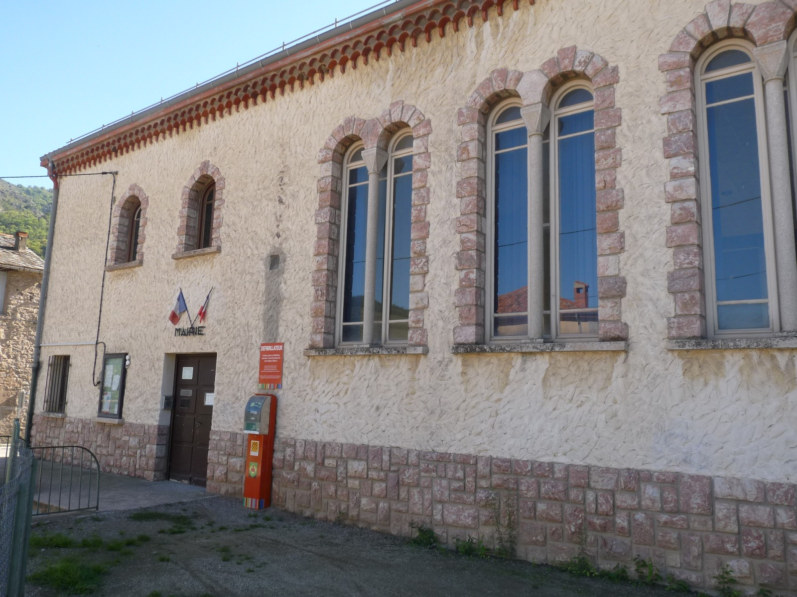 Mairie de Sahorre, Pyrénées-Orientales, France